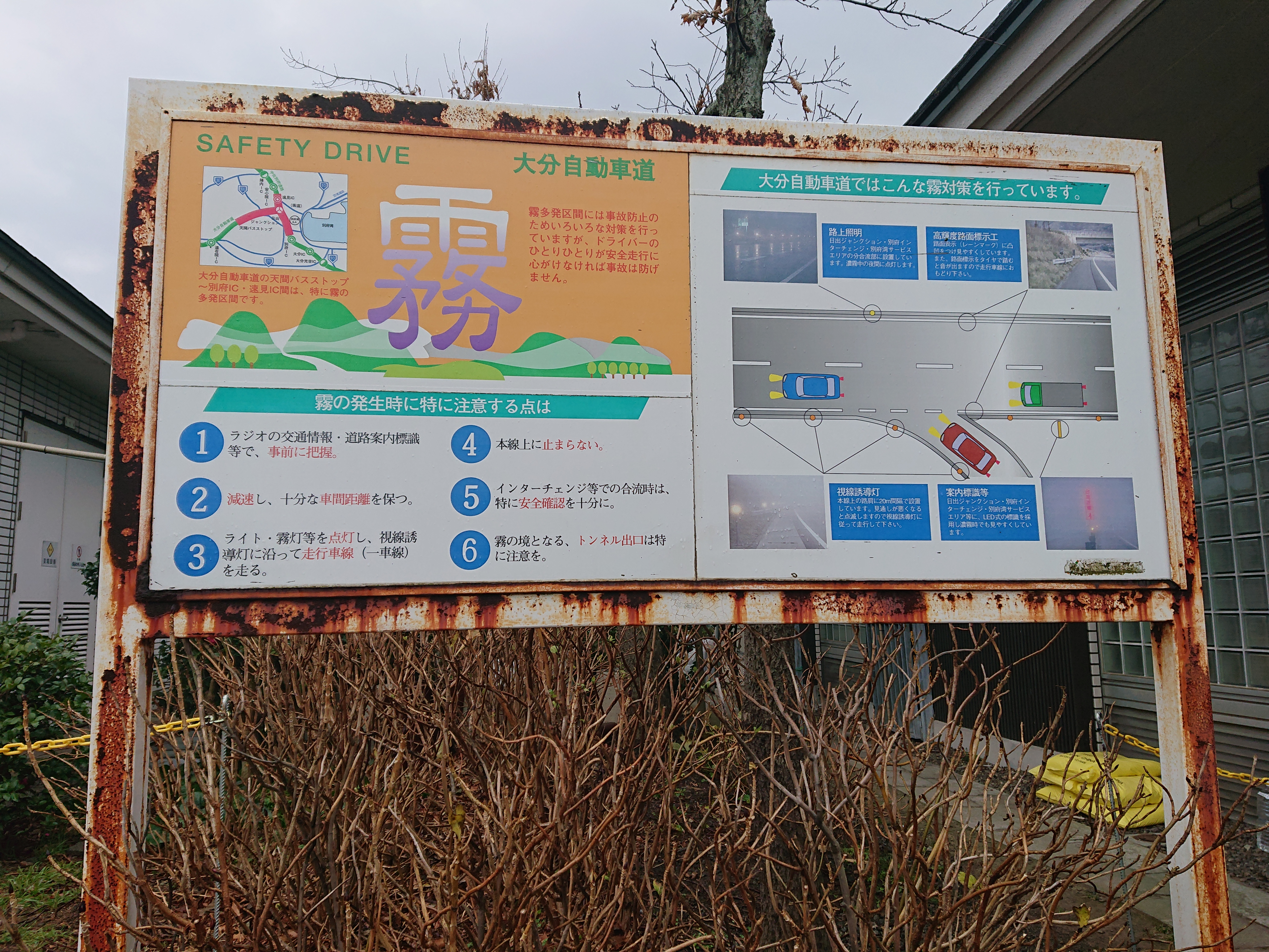 大分道所属時に別府サービスエリアに設置された「大分道の霧」に関する解説。一部区間は東九州道に編入されている。